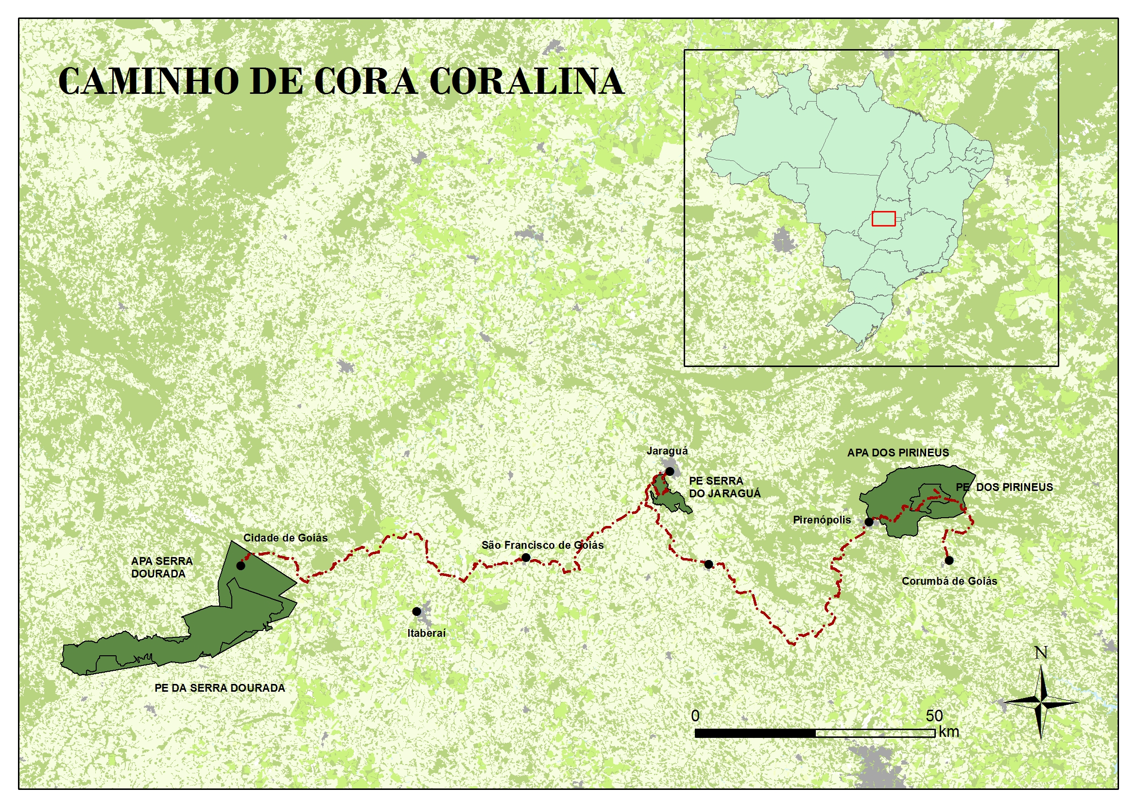 Figura do Caminho de Cora Coralina. Contém o percurso, as unidades de conservação, os municípios envolvidos e classes de ocupação e uso do solo.